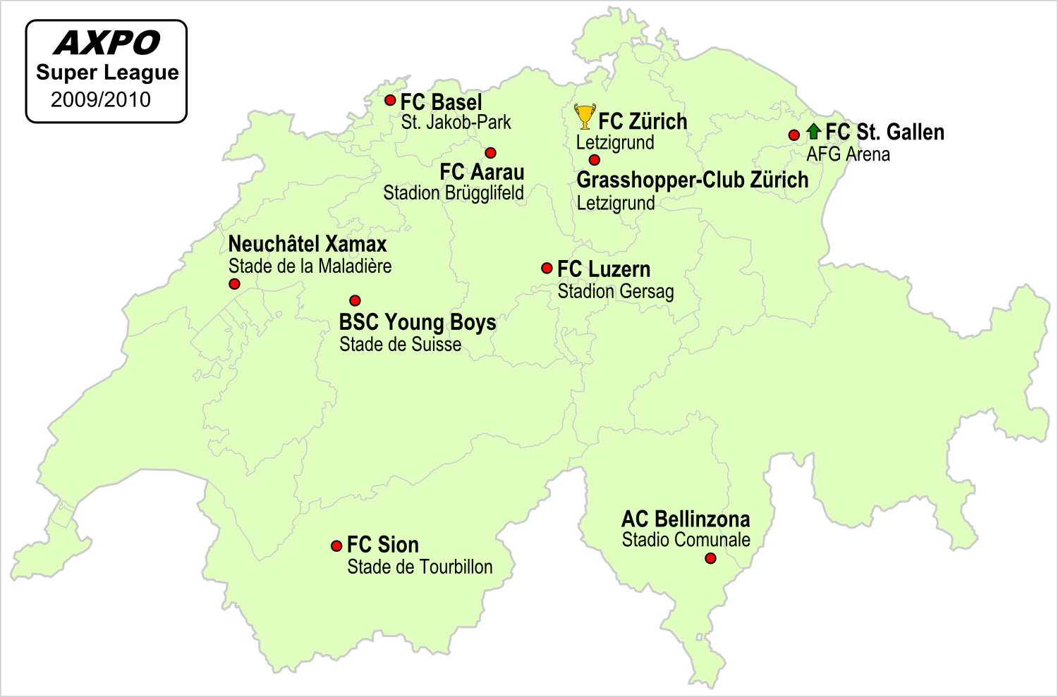 Karte der Vereine der Schweizer Axpo Super League 2009/2010